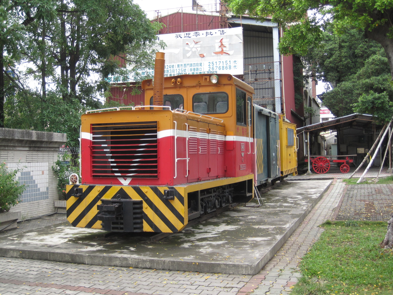 臺糖的溪州946號內燃機車，現存臺南永康國小